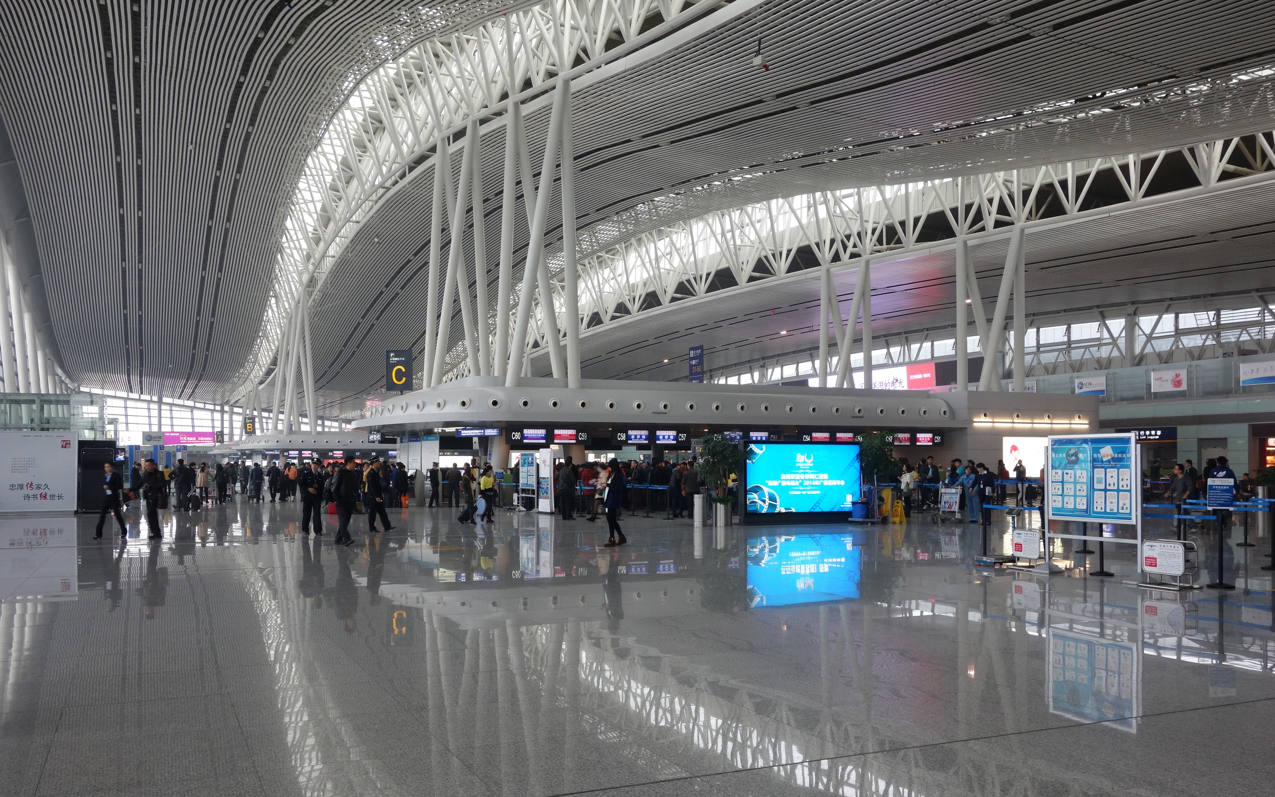 长沙黄花国际机场离港出发大厅